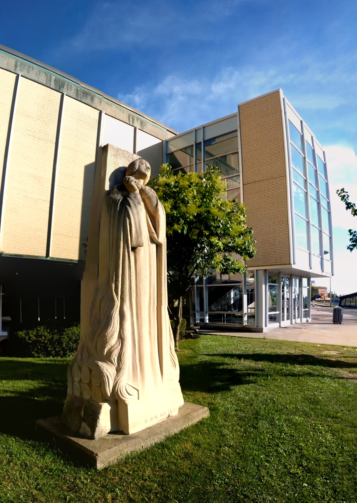 La sculpture Jeanne au bûcher est une réplique de la statue originale de 1928. Elle fut offerte Maxime Real del Sarte à Rouen. En 1950, l’artiste l'offre à Mgr Maurault, recteur de l’Université de Montréal.